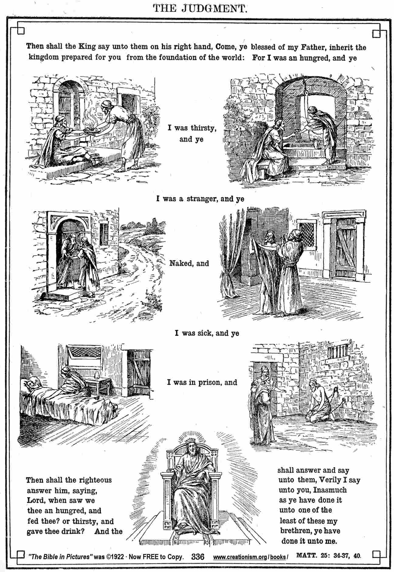 From a public domain picture bible